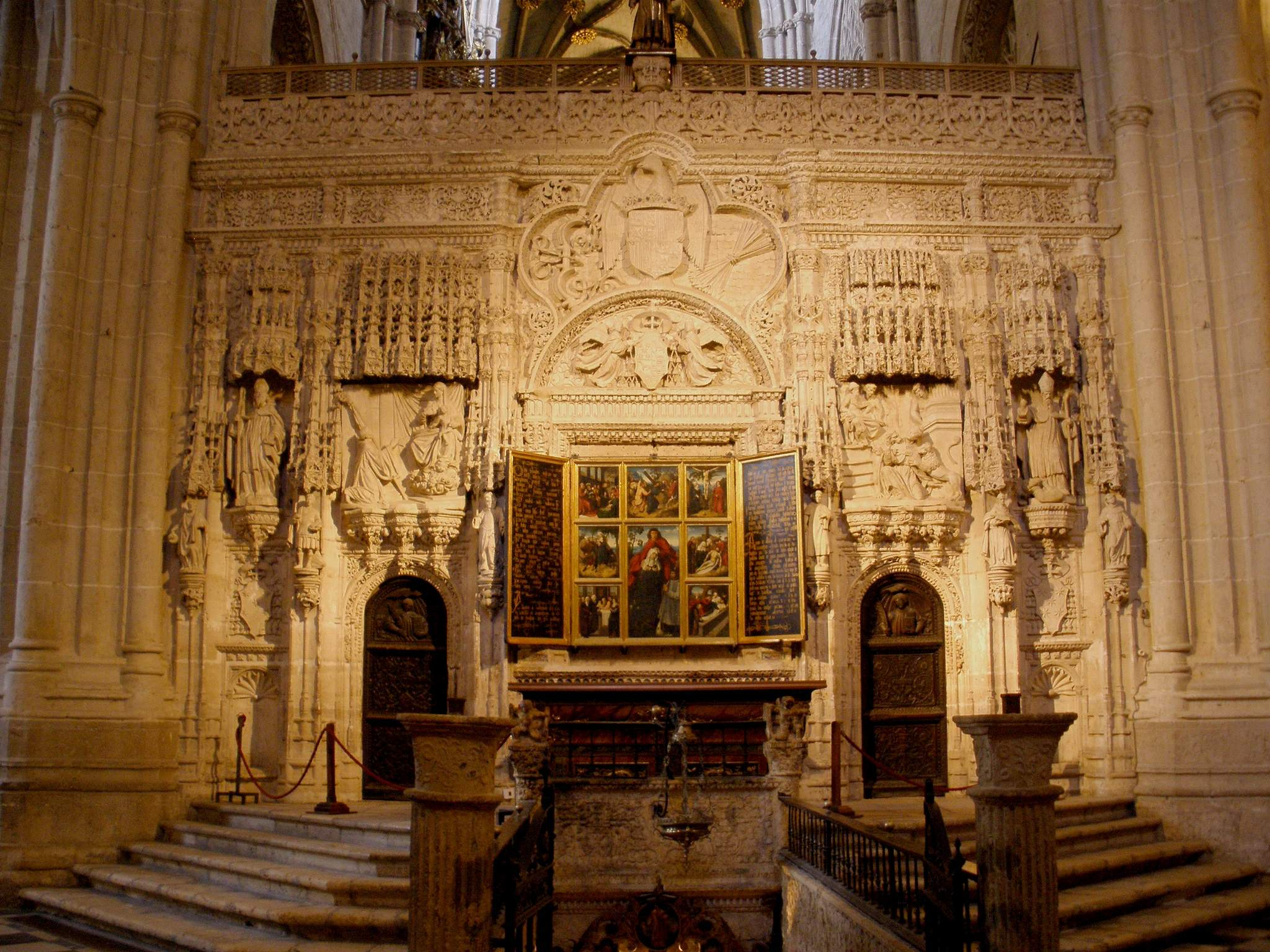 Trascoro de la Catedral de Palencia